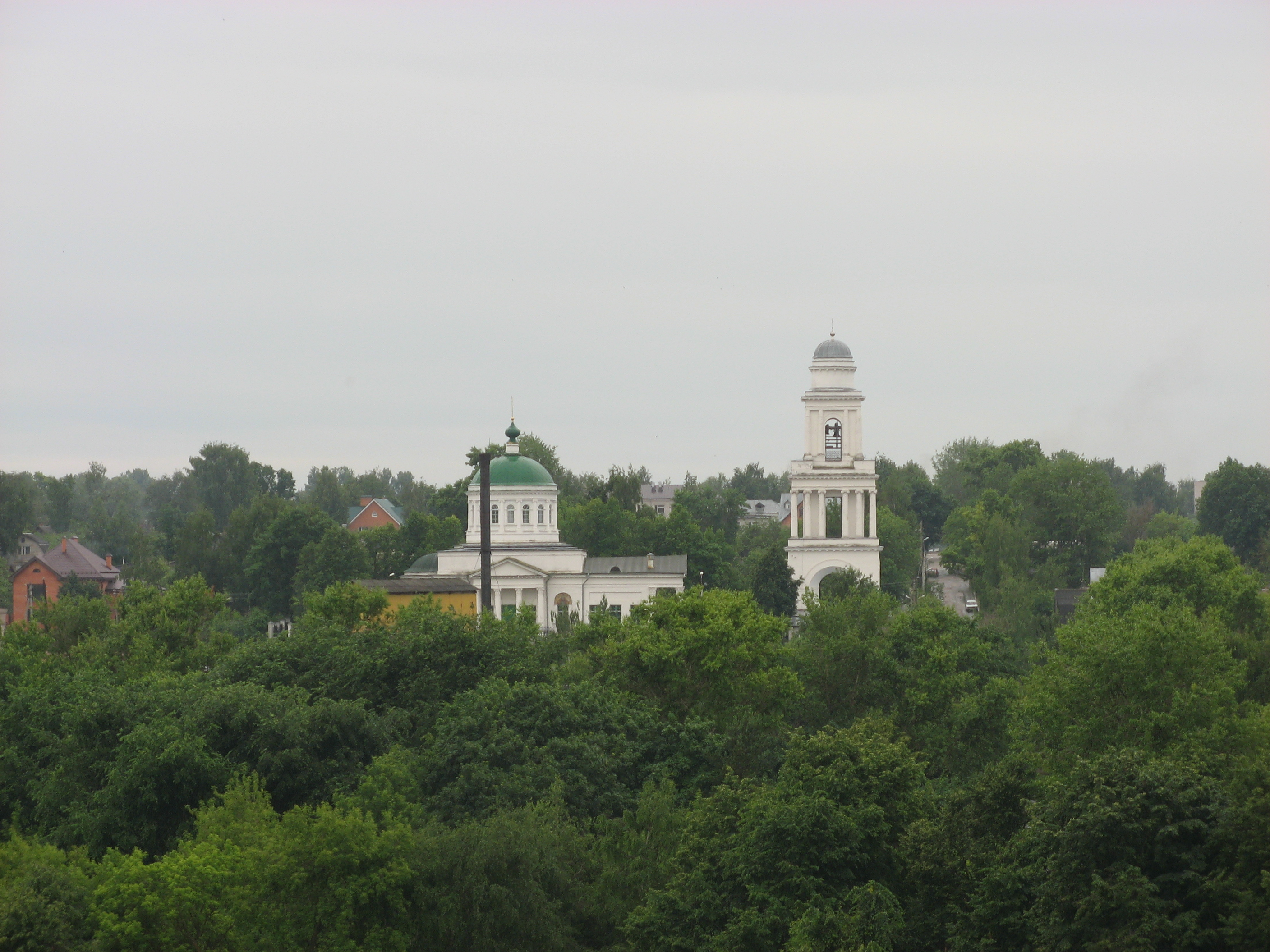 Церковь в Ржеве